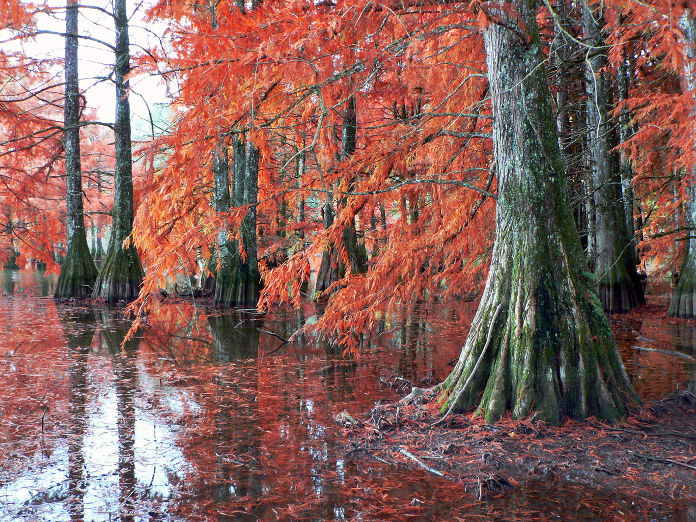 Les cyprès chauves de l'étang de Boulieu, à Saint-Baudille-de-la-Tour, Isère, AuRA, France.